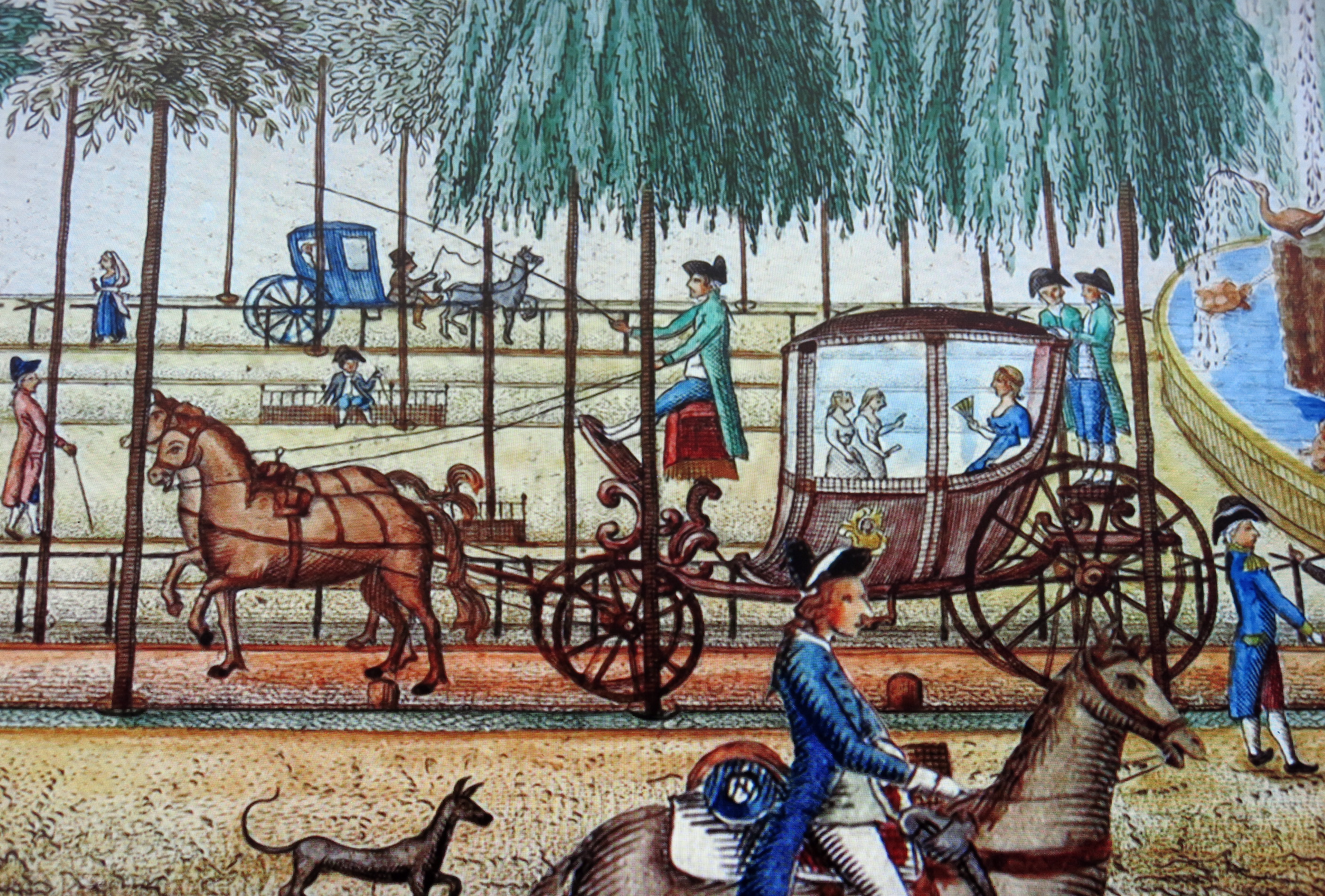 Mercat del Born (Barcelona)